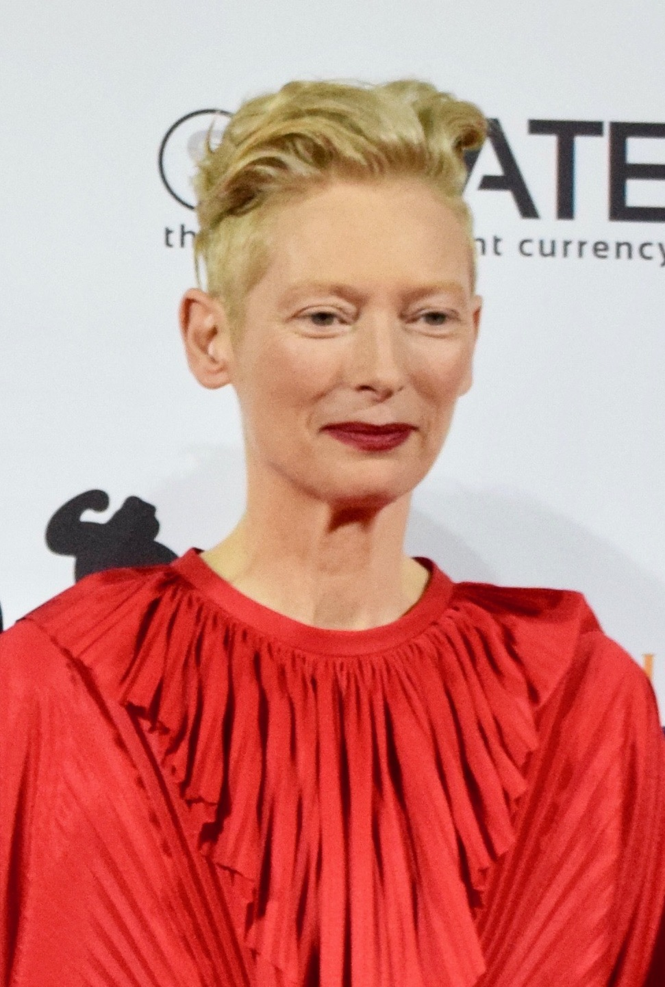 Festival de cinema de Sitges 2018